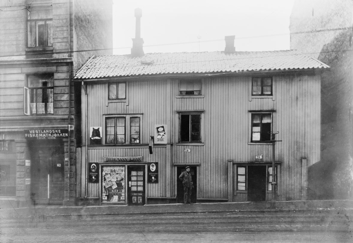 Briskebyveien 28 ca. 1910-15. Bygningen er siden revet. Foto: Johannes Holmsen. Fra Byhistorisk samling hos Oslo Museum.